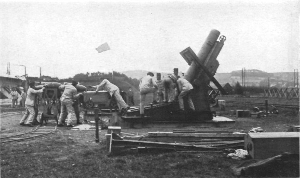 Photograph of French Mortier de 280mm Schneider elevated for firing. See also : Image:Mortier de 280 Schneider Disassembled For Transport.jpg Image:Mortier de 280 Schneider In Action.jpeg Image:Mortier de 280 Schneider Loading.jpeg Image:Mortier de 280 Schneider Elevated Left Rear View.jpg